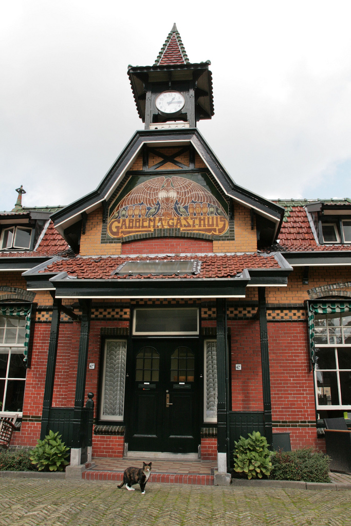 Wijbrand de Geeststraat 42, Leeuwarden Architect: W.C. de Groot